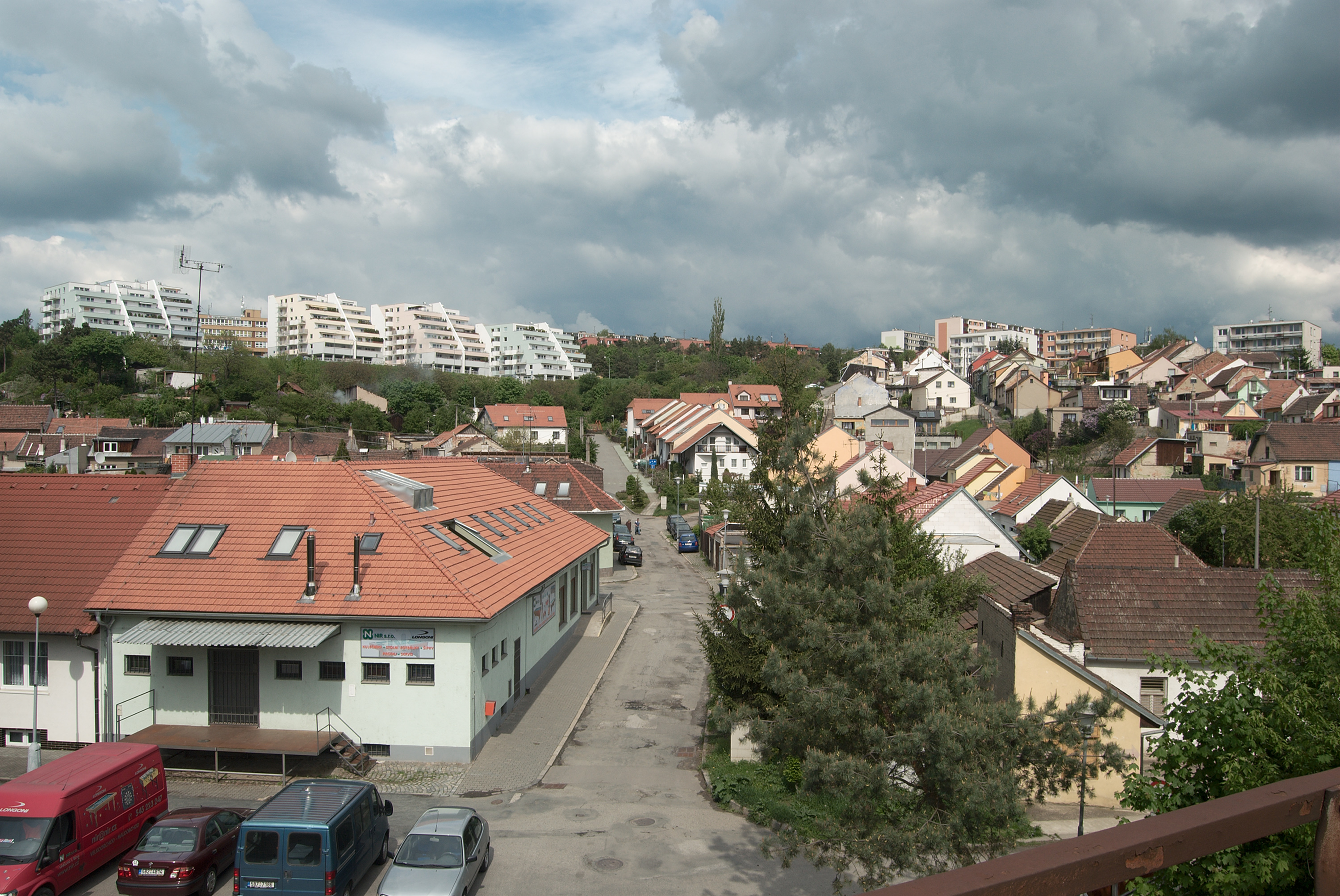 Česky: Brno-Lesná - Divišova čtvrť. Vyfotografováno od jihu z železničního mostu. V pozadí okrajové domy sídliště Lesná